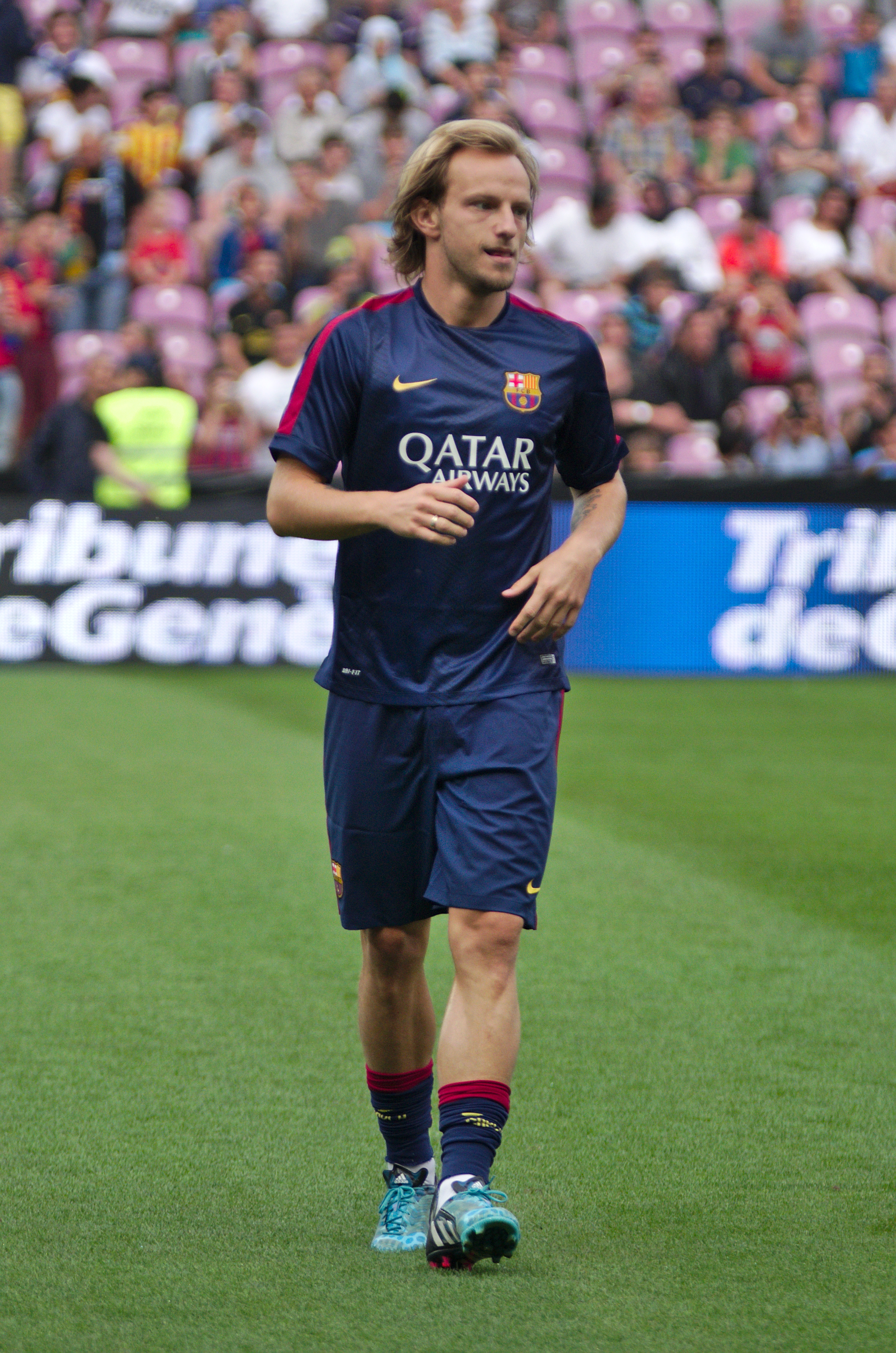 Barça - Napoli - 20140806 - Ivan Rakitic